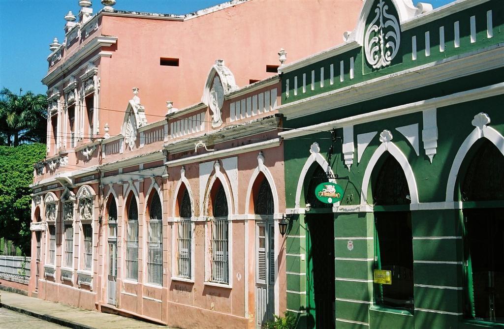 Street in Olinda, Brazil